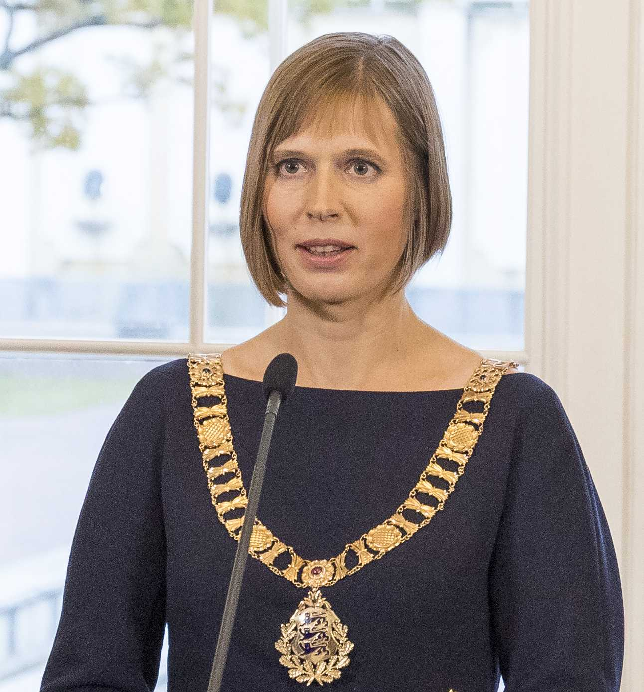 Kersti Kaljulaid. Vabariigi Presidendi ametisse astumise tseremoonia.